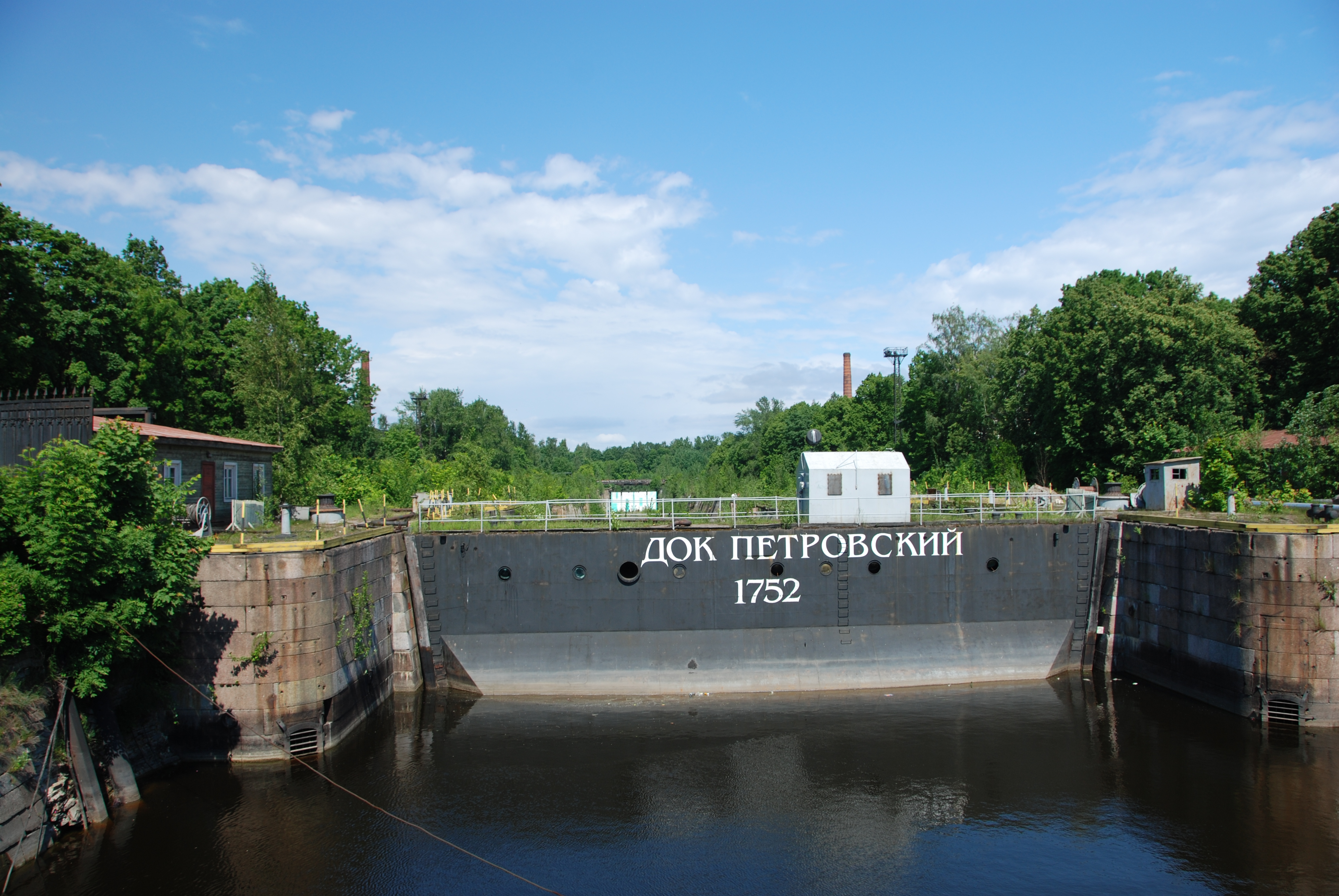 Док Петровский (южный) (Санкт-Петербург и Лен.область, Кронштадт, Адмиралтейство)